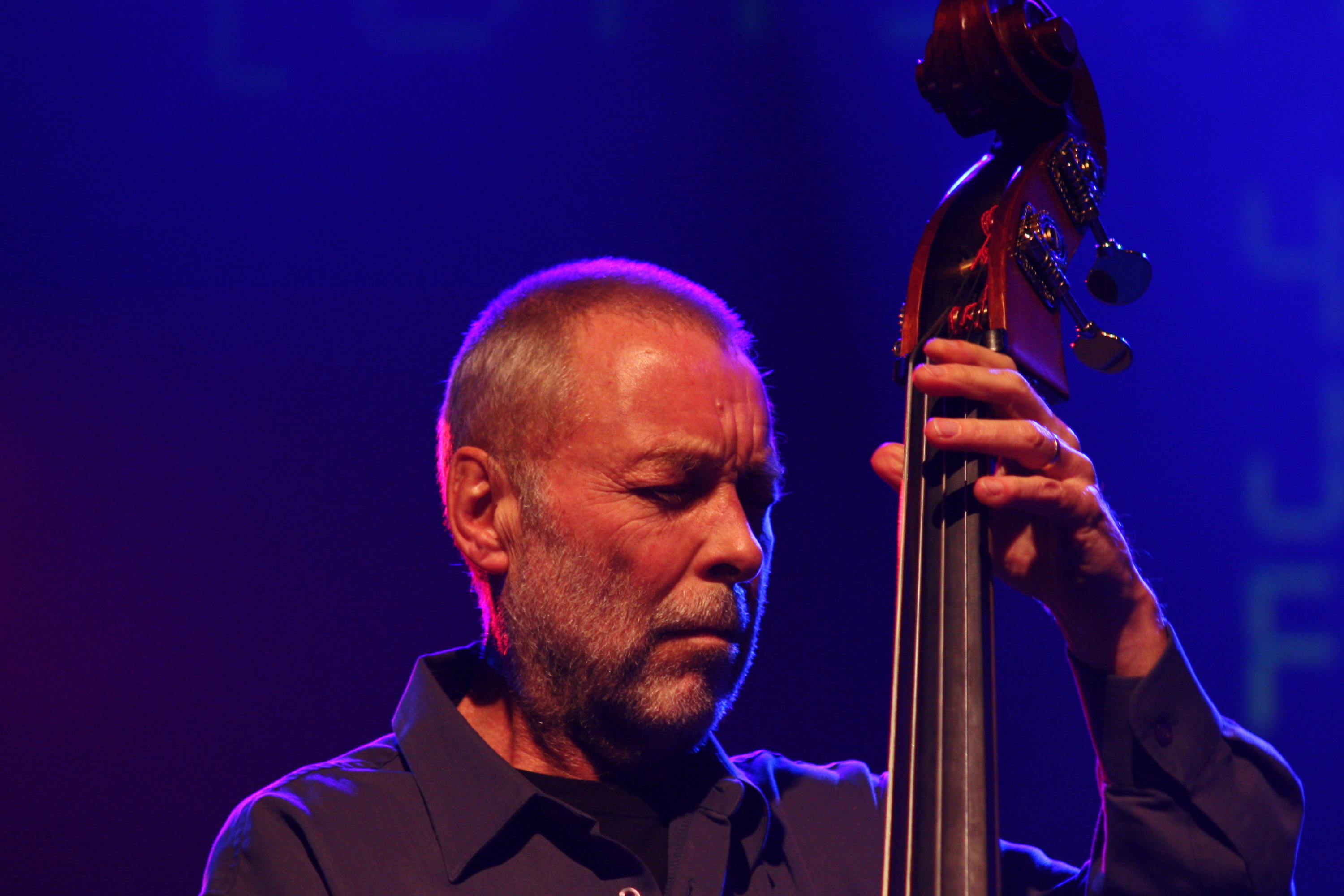 44. Deutsches Jazzfestival Frankfurt 2013: Dave Holland